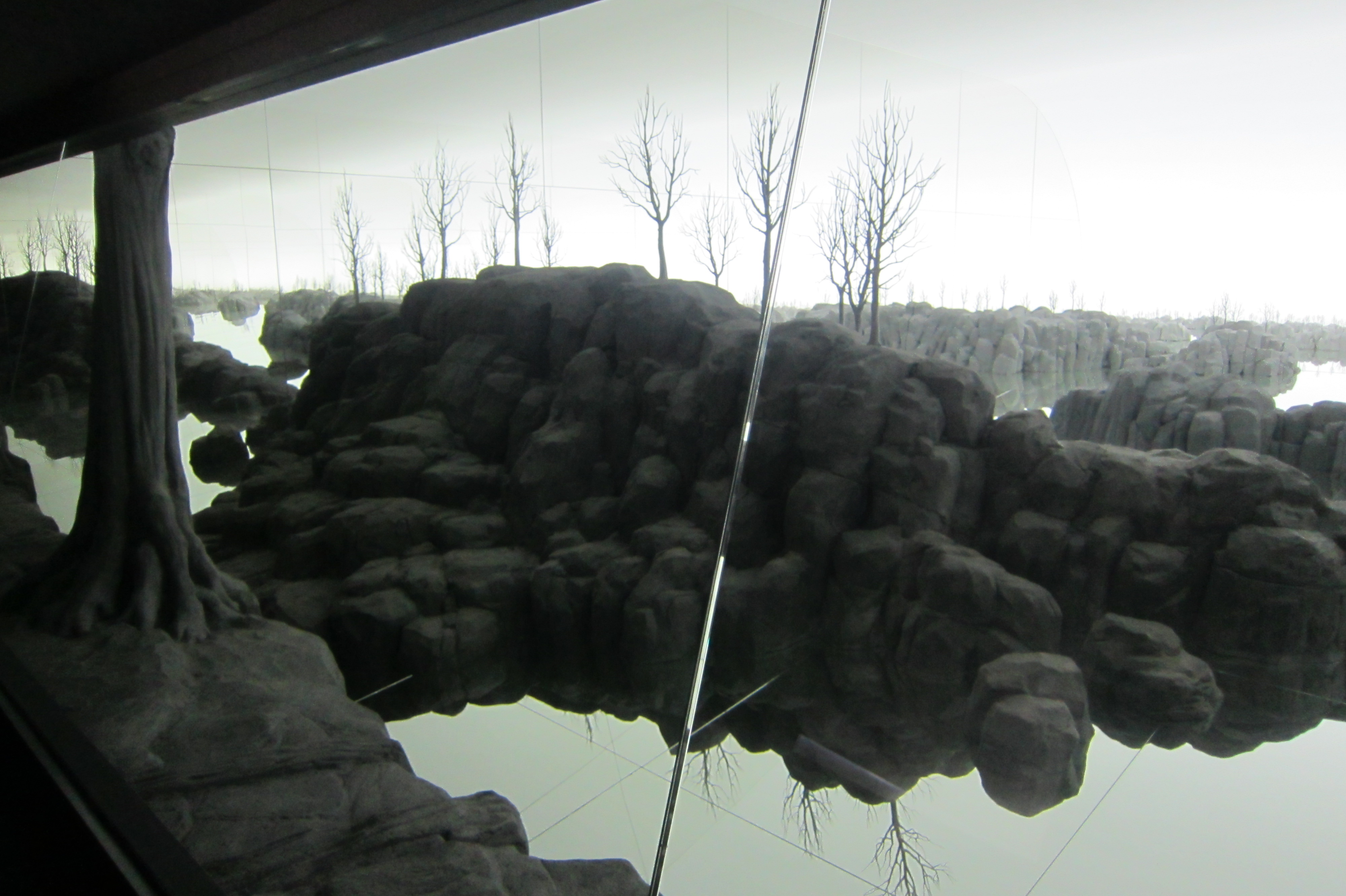 Hans Op de Beeck, The Quiet View, 2015, installatie in site Herkenrode, Hasselt